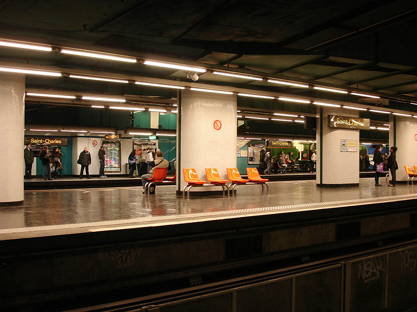 Station Saint-Charles du métro de Marseille, France.